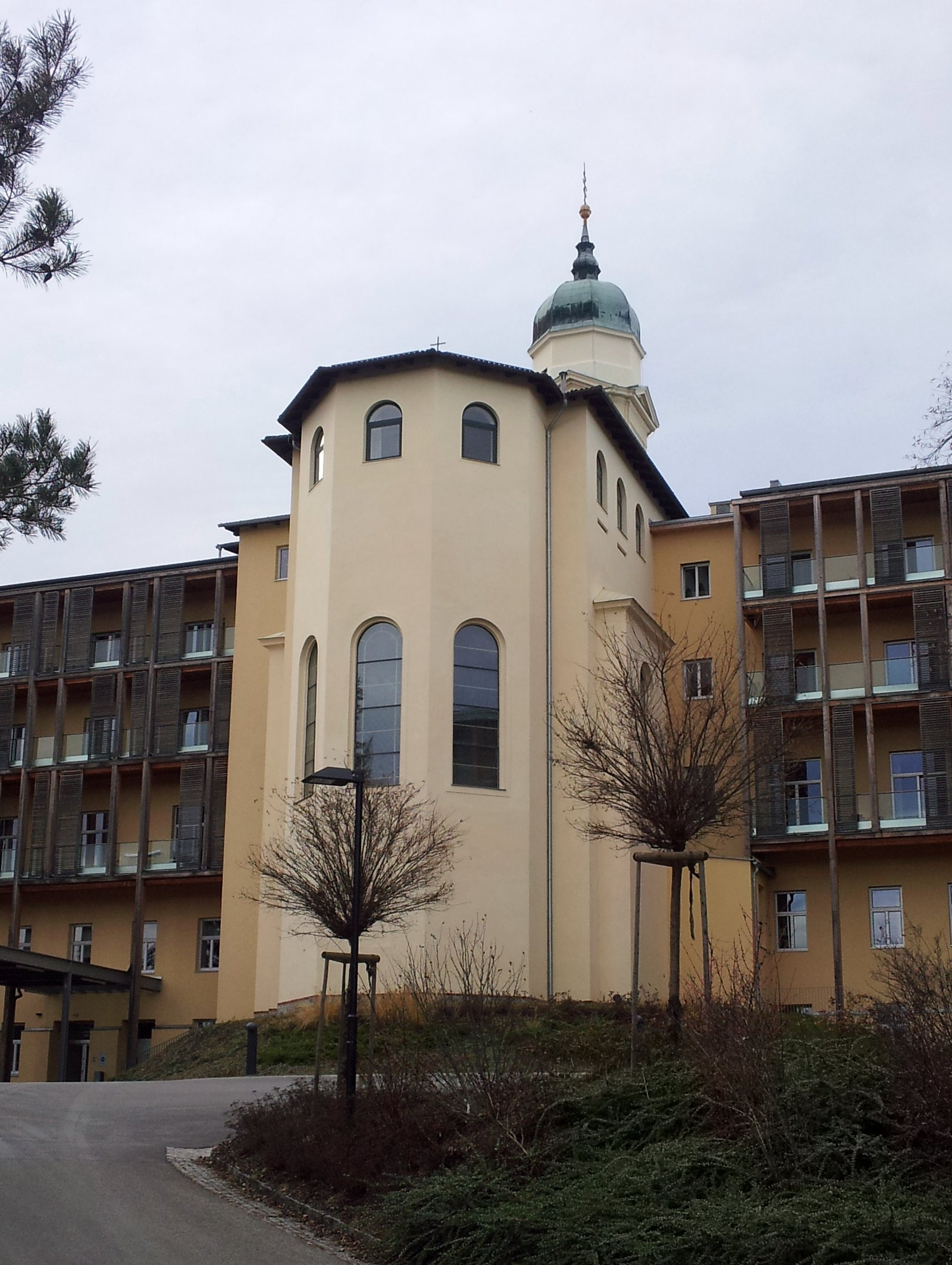 Anstaltskapelle des Johannes-von-Gott-Pflegezentrums - Blick auf die Apsis